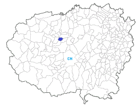 posizione del comune in provincia di Cuneo